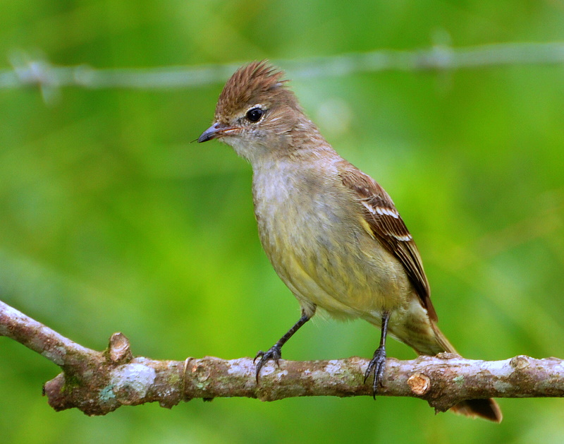 Lanchonete OASYS - Margem do rio Ribeira de Iguape - Registro-SP - Brasil